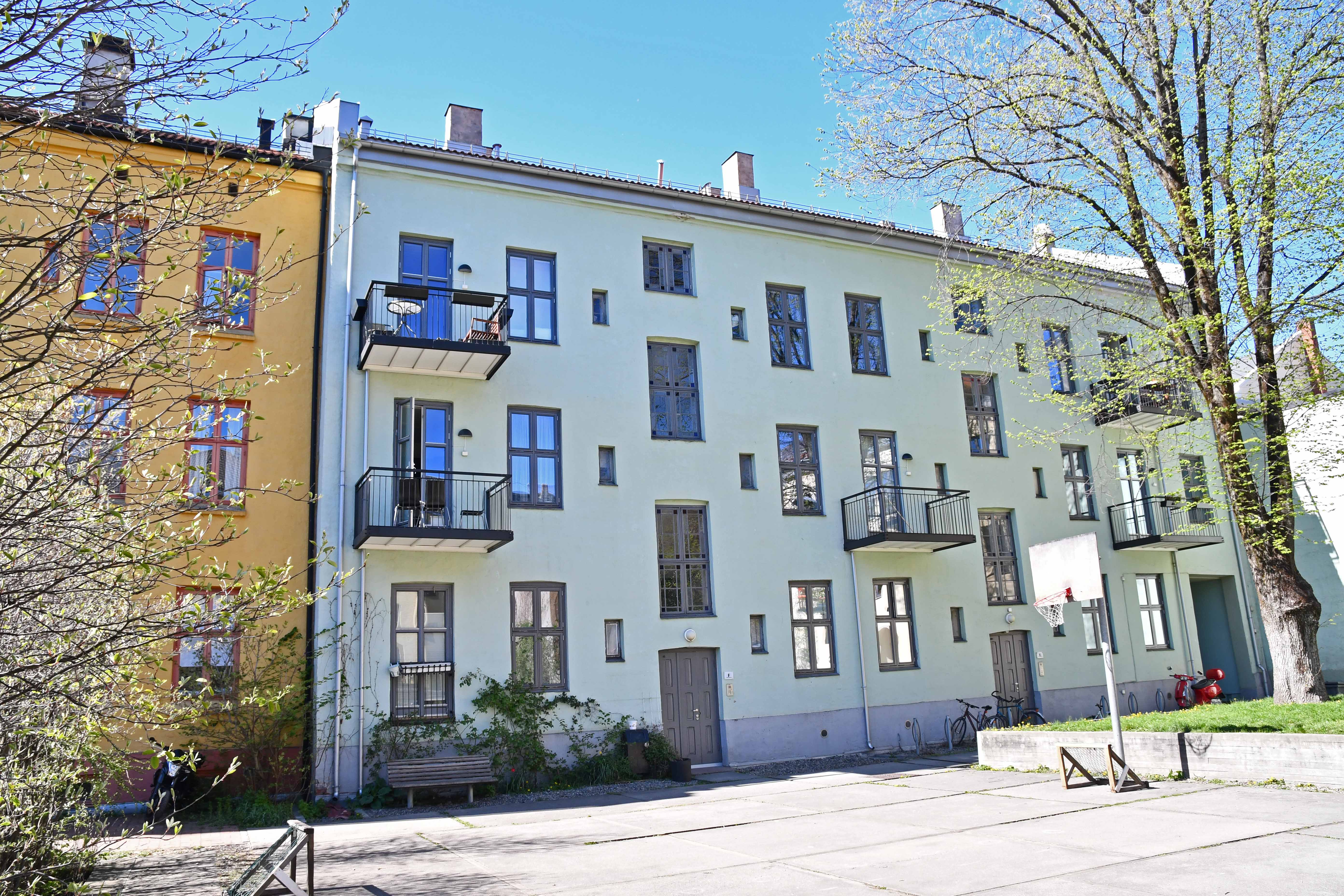 Markveien 56 E F og J. Bakgård i Kvartalet Markveien / Leirfallsgata / Thorvald Meyers gate / Korsgata. Utbedret som del av byfornyelsen i 1978 til 1981, arkitekt T. Thorenfeldt.